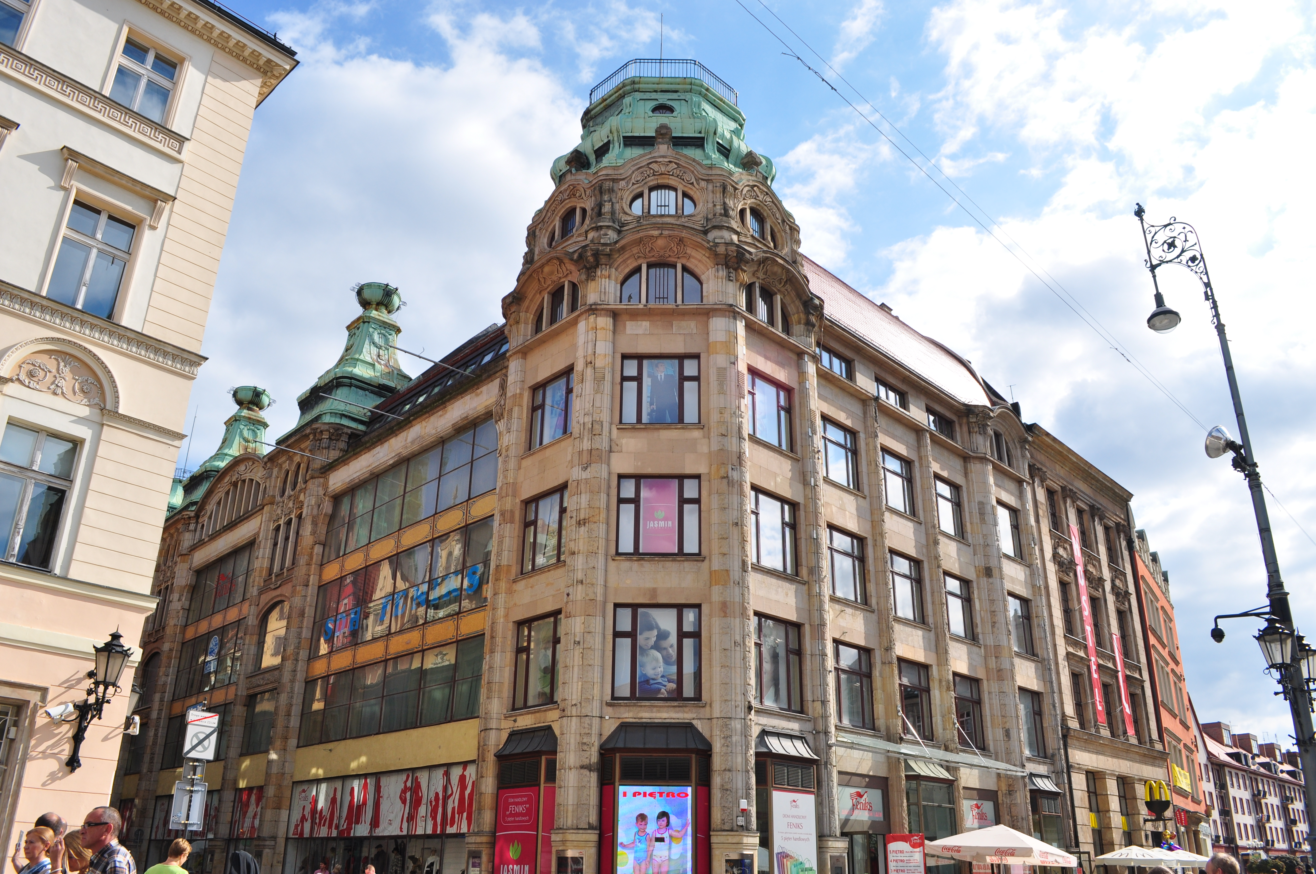 Dom Towarowy „Feniks” Rynek 31- „Pod Złotym Dzbanem” - rozebrana 1902 Rynek 31/32, Miasto Wrocław - Stare Miasto